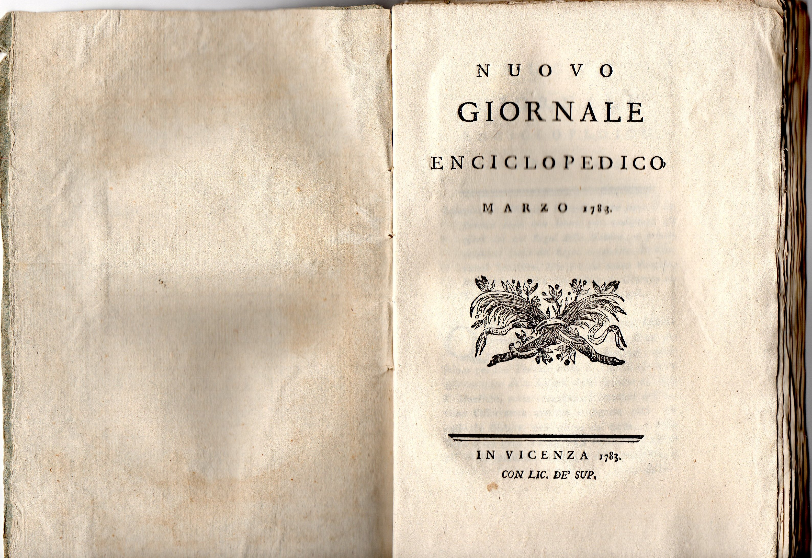 Elisabetta Caminer (a cura di). Nuovo Giornale Enciclopedico, fascicolo marzo 1783, Vicenza.